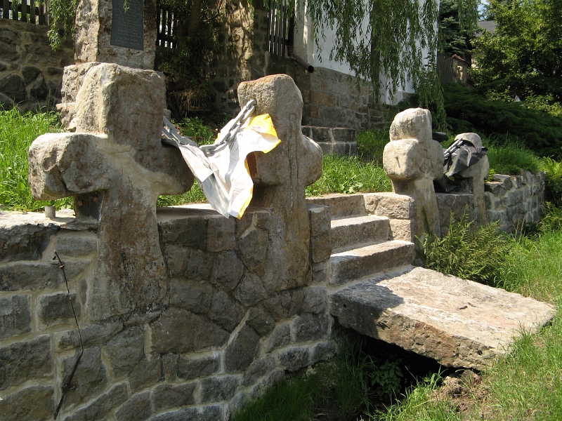 Smírčí kříž - čtyři (Knínice), u pomníku padlých, Knínice, Knínice (Libouchec).